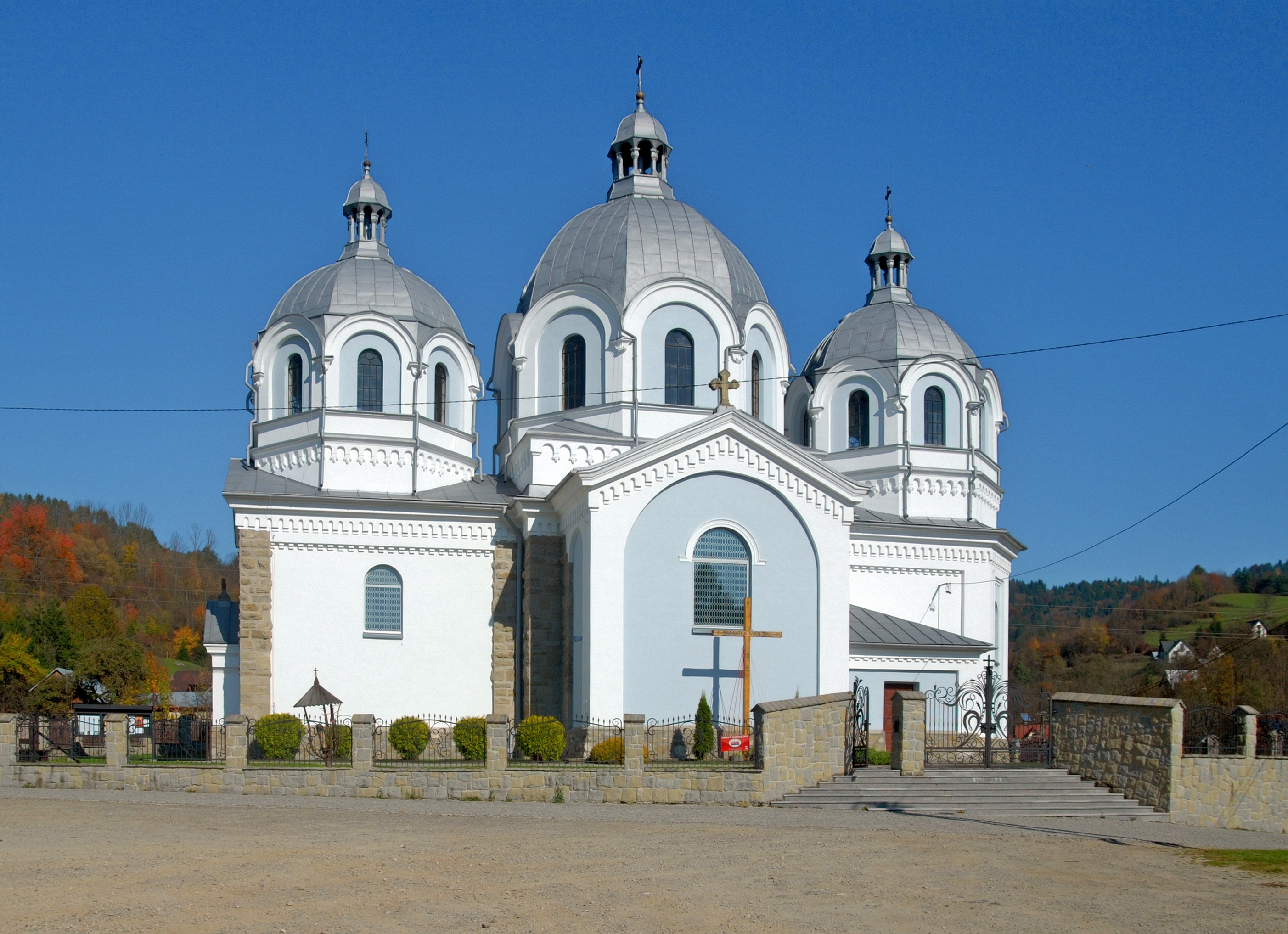 wieś Szlachtowa